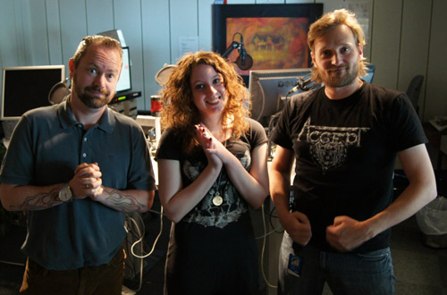 Panthera Publishing gjest hos Pyro på NRK p3.. Forlagssjef Anette Sivertstøl ble invitert som gjest ho Pyro på NRK p3 for å tolke tekster i moderne metal.